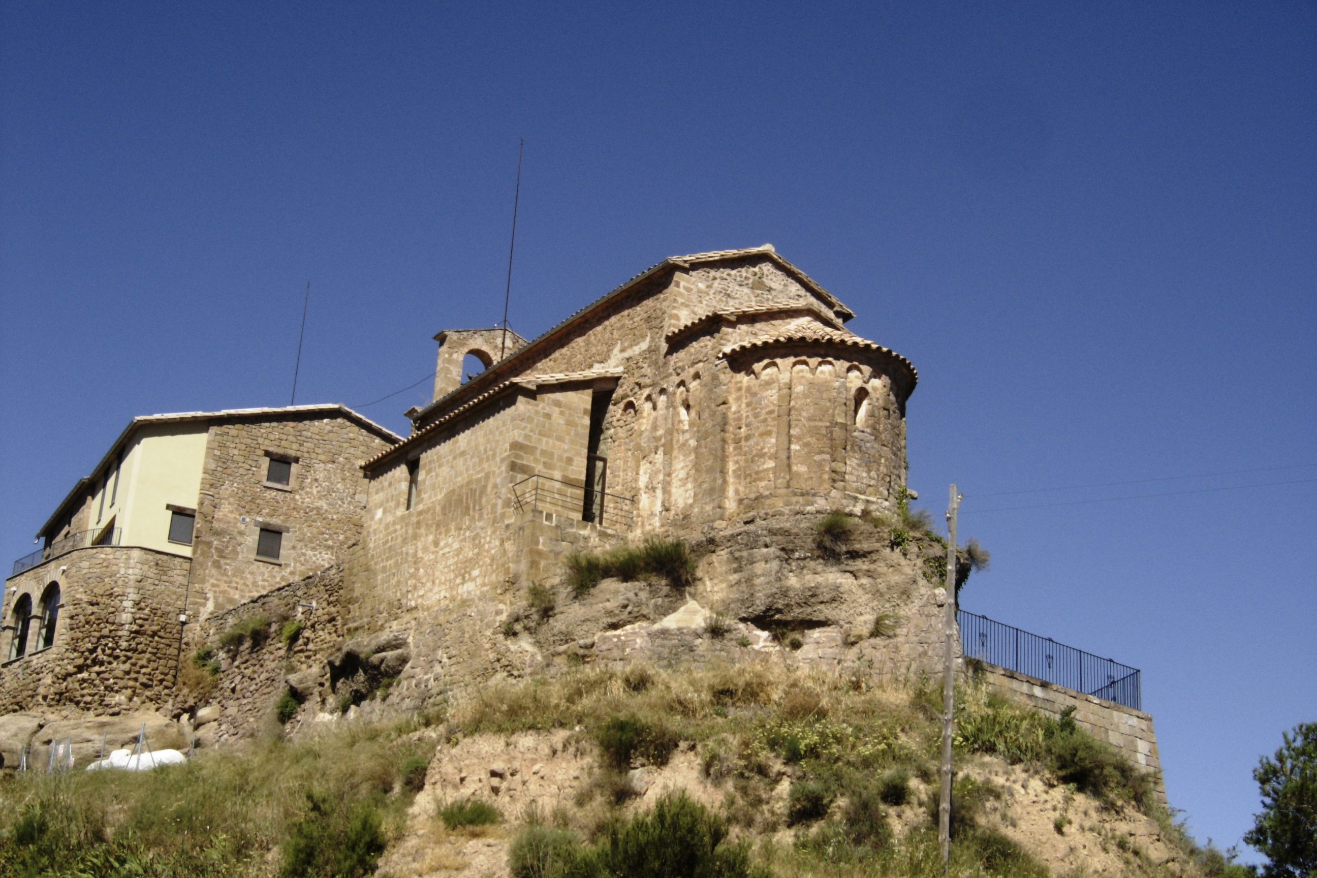 L'església romànica de Sant Julià de Ceuró.